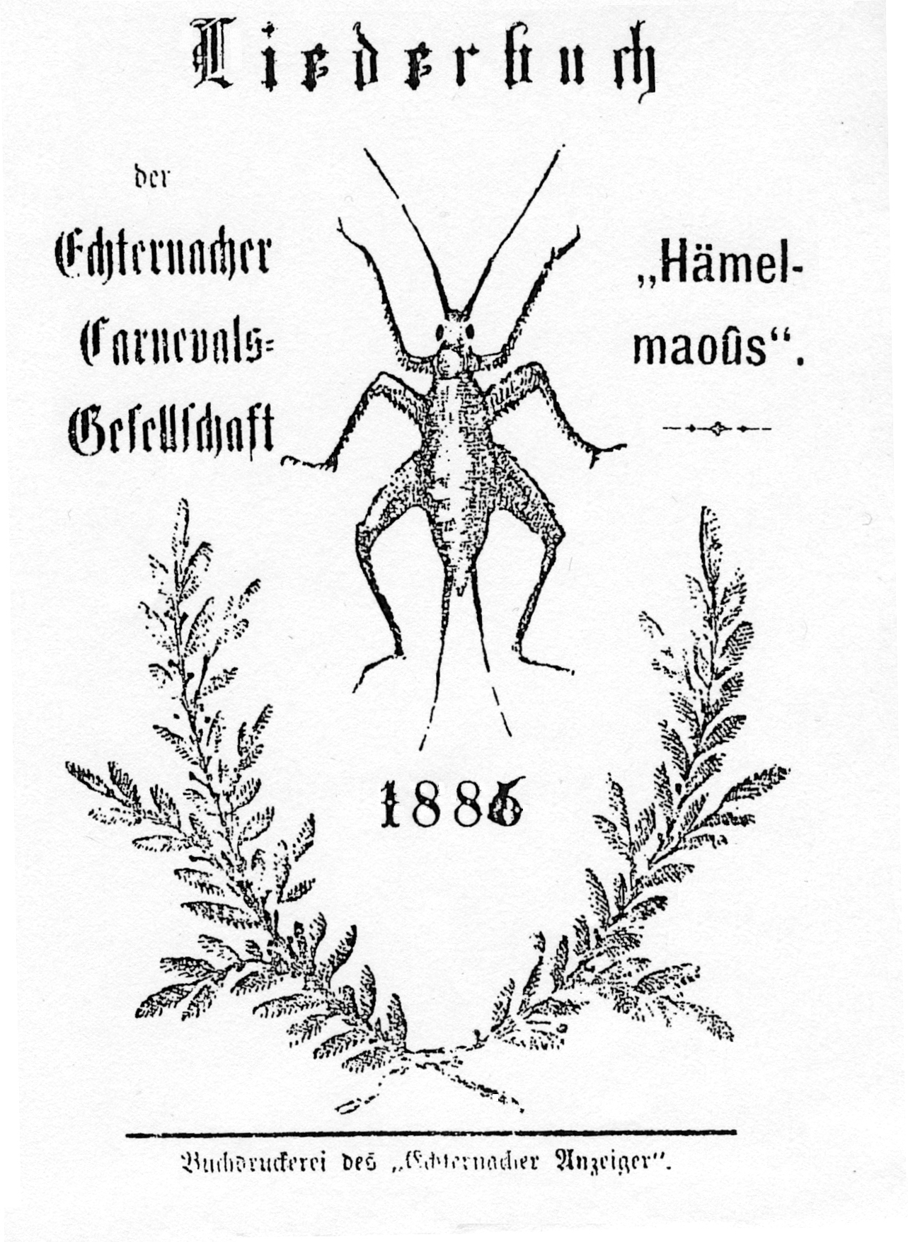 Liederbuch der Echternacher Carnevals-Gesellschaft "Hämelmaoûs". Buchdruckerei des "Echternacher Anzeiger" (Deckel).